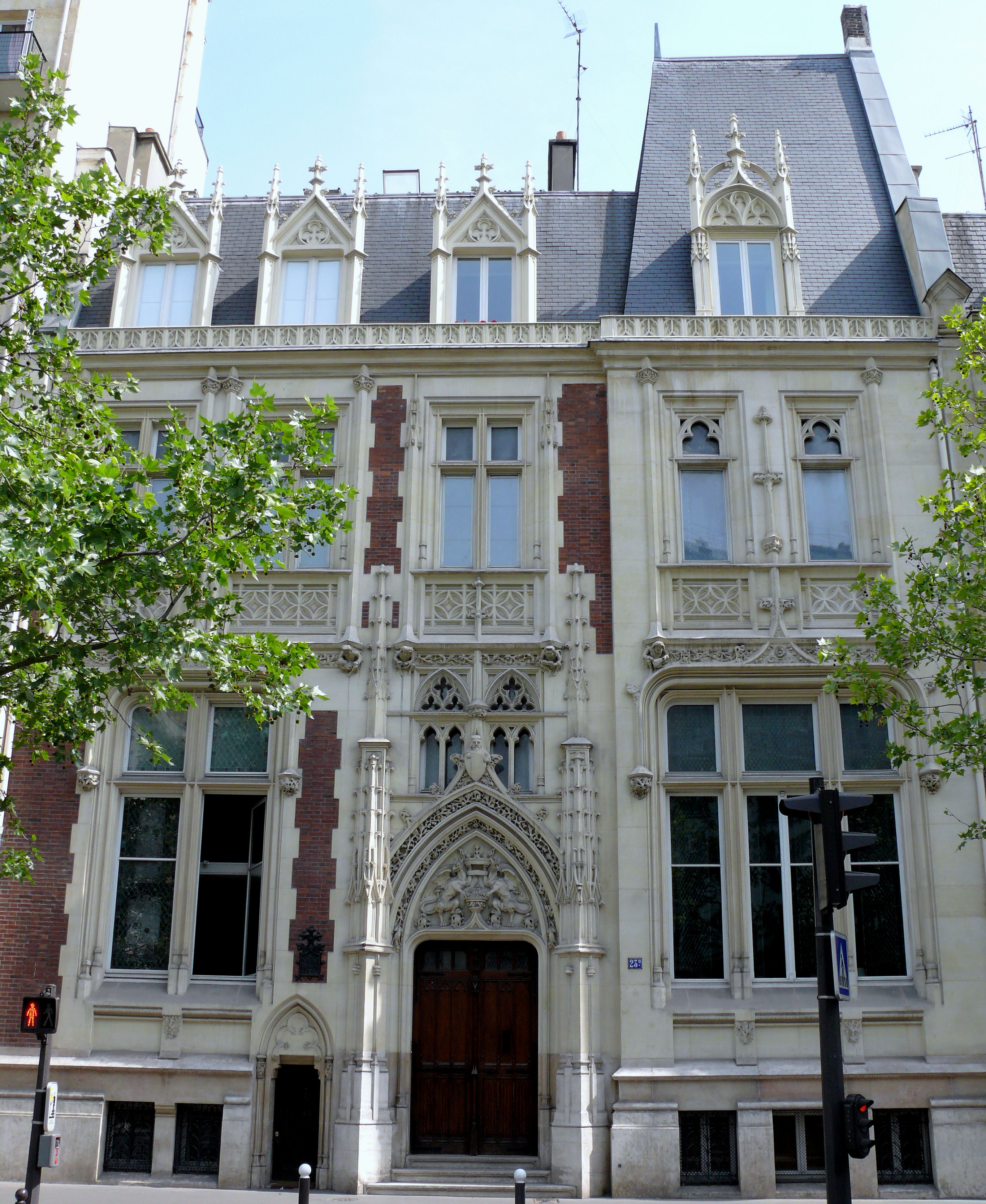 Paris 17ème arrondissement - Hôtel particulier 23ter boulevard Berthier